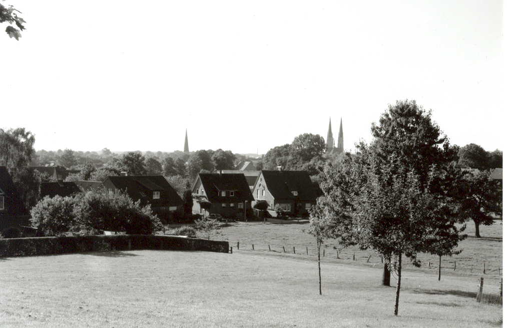 Die Stadtansicht von Billerbeck von Süden her, eigenes Bild, GNU FDL